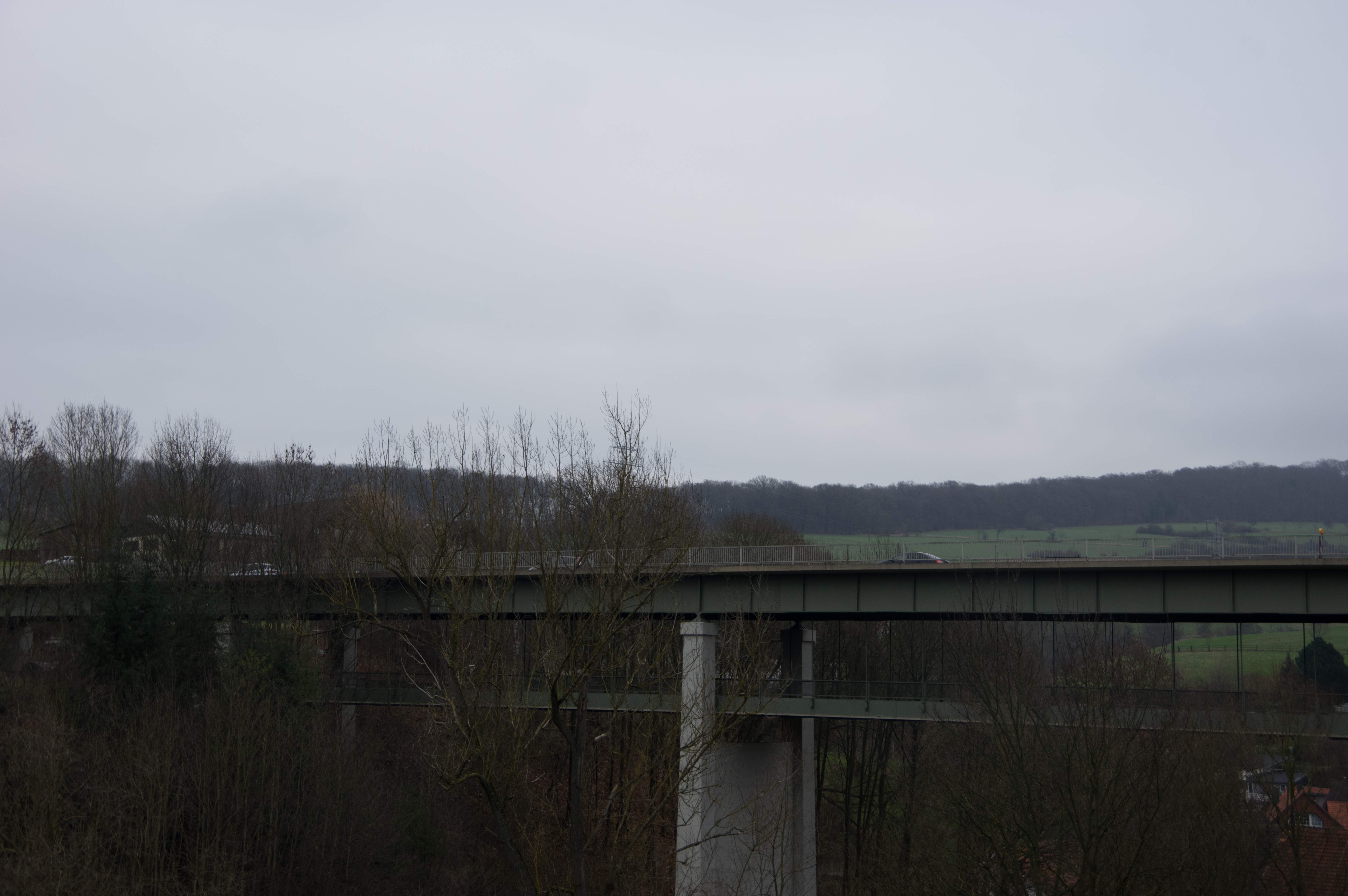 Einbeck, Ortsteil Kuventhal in Niedersachsen. Die Brücke steht unter Denkmalschutz. Sie führt über die Bundesstraße 3.